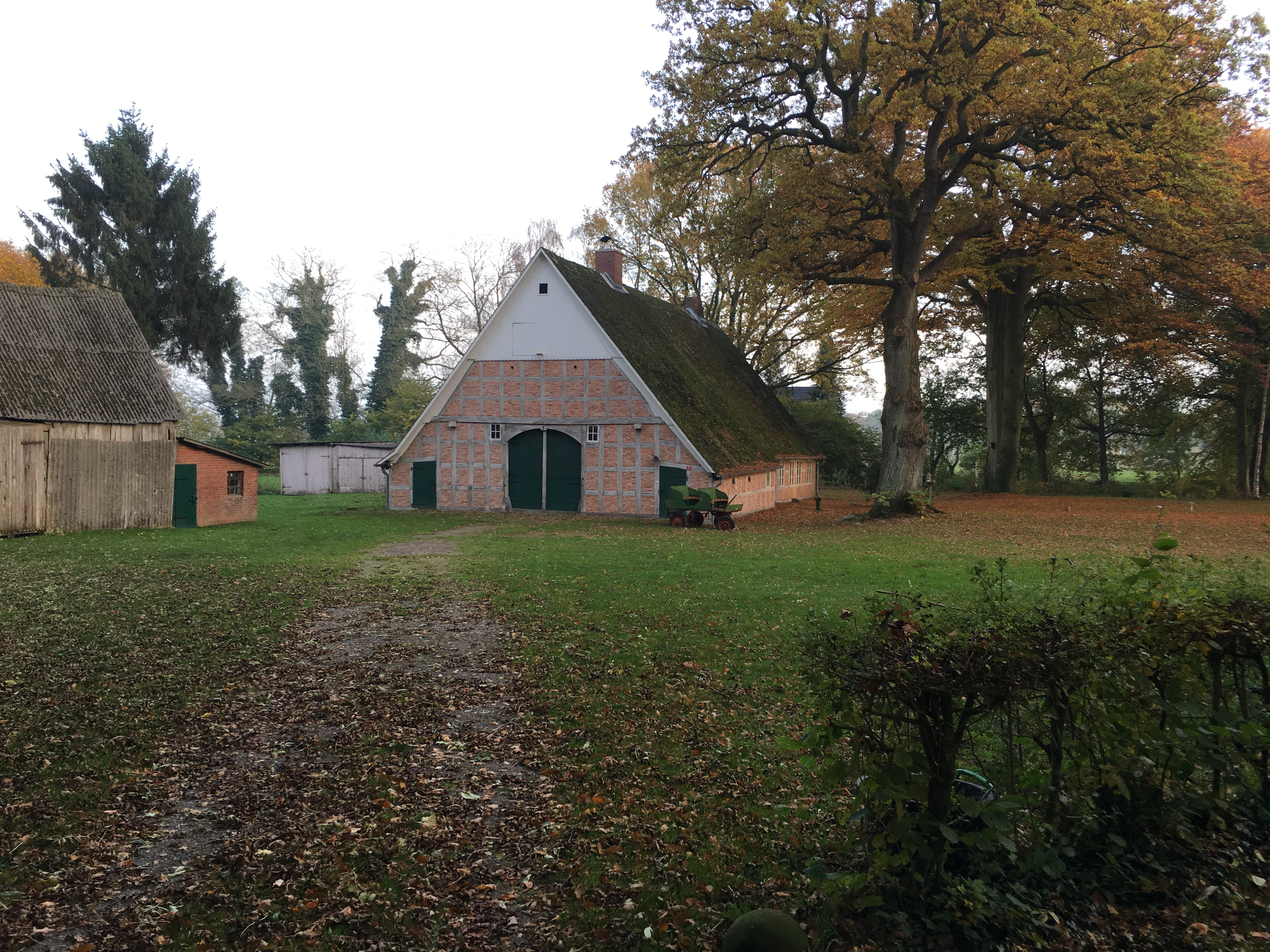 Oold Buurnhuus in Genhöben, Wittenmoor, Wingst